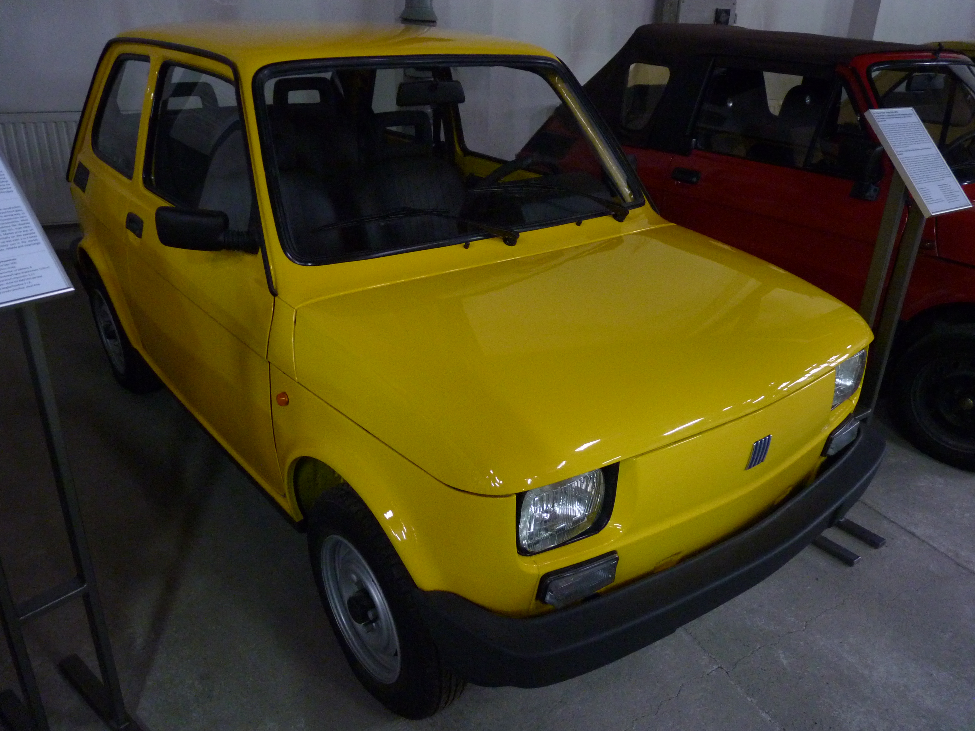 Fiat 126 elx Maluch Town Happy End at Muzeum Inżynierii Miejskiej in Kraków.